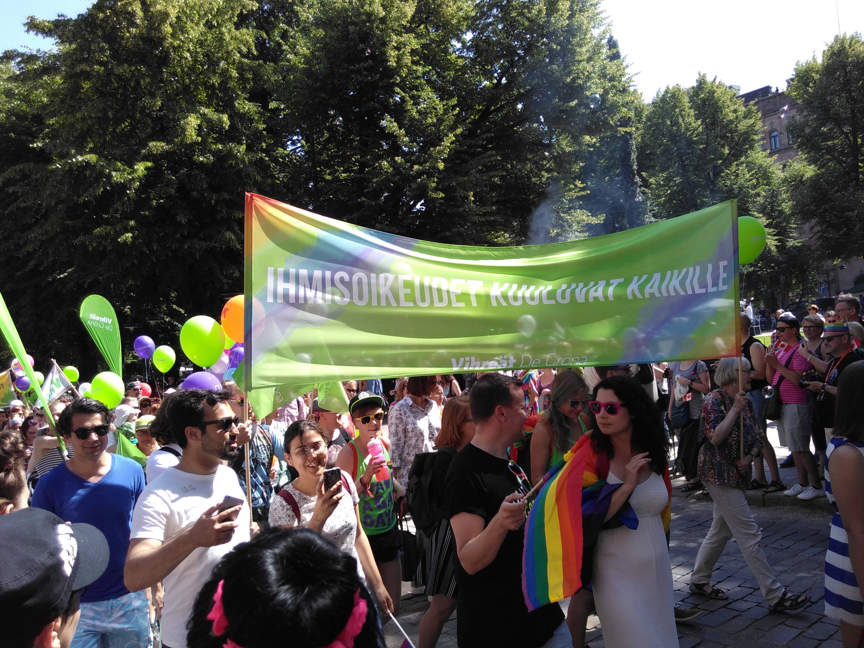 Vihreät Helsinki Pride -kulkuessa 2016. Kuvassa mm. Ville Niinistö, Ozan Yanar, Ville Ylikahri ja Emma Kari.